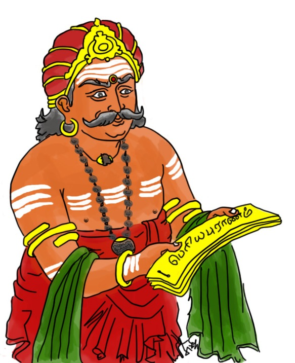 பெரியபுராணம் தந்த சேக்கிழார்